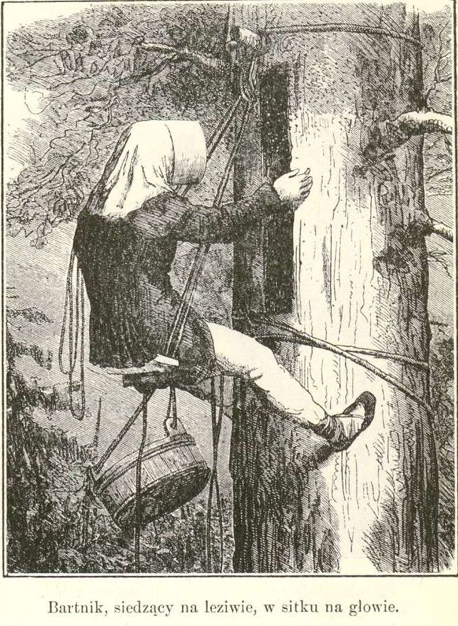 Bartnik siedzący na leziwie, w sitku na głowie